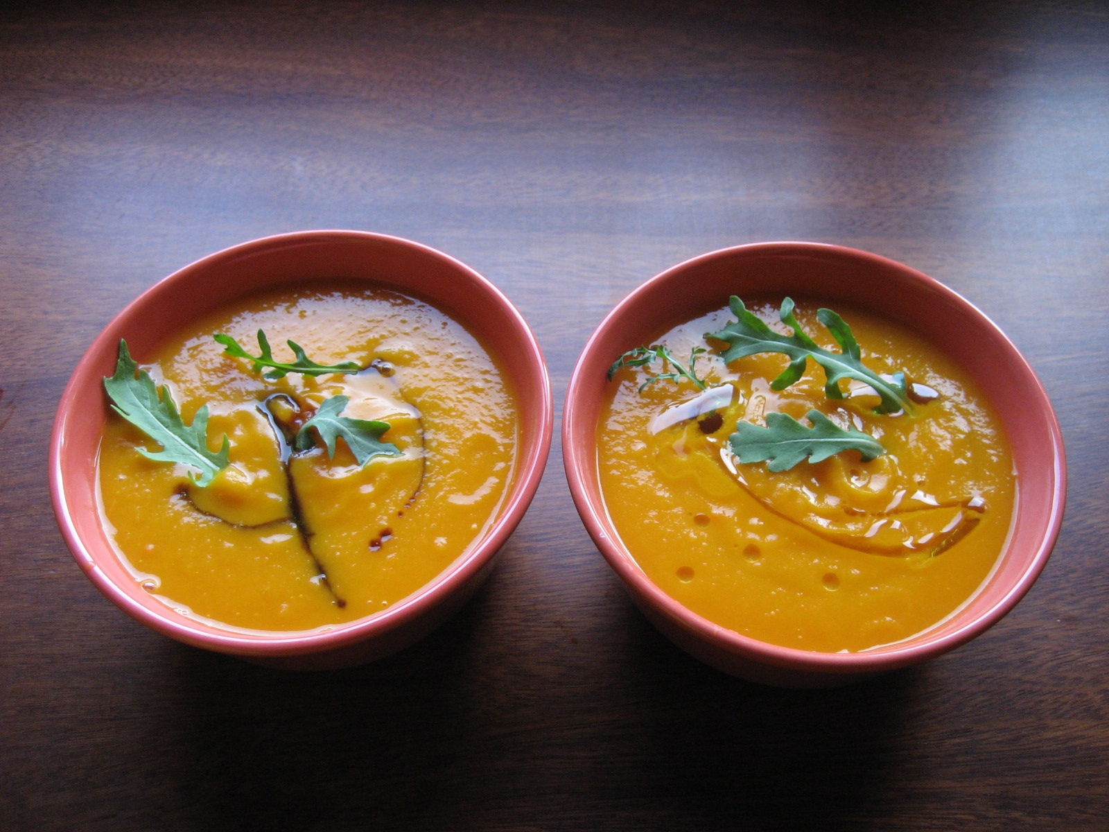 Crema de calabaza aunque también contiene un poco de pimiento verde (italiano), rojo (morrón) y una cebolla pequeña. Sal y un poco de aceite. Añadido a la hora de servir hojas de rucola, a uno de ellos salsa de soja y al otro aceite de oliva virgen extra.